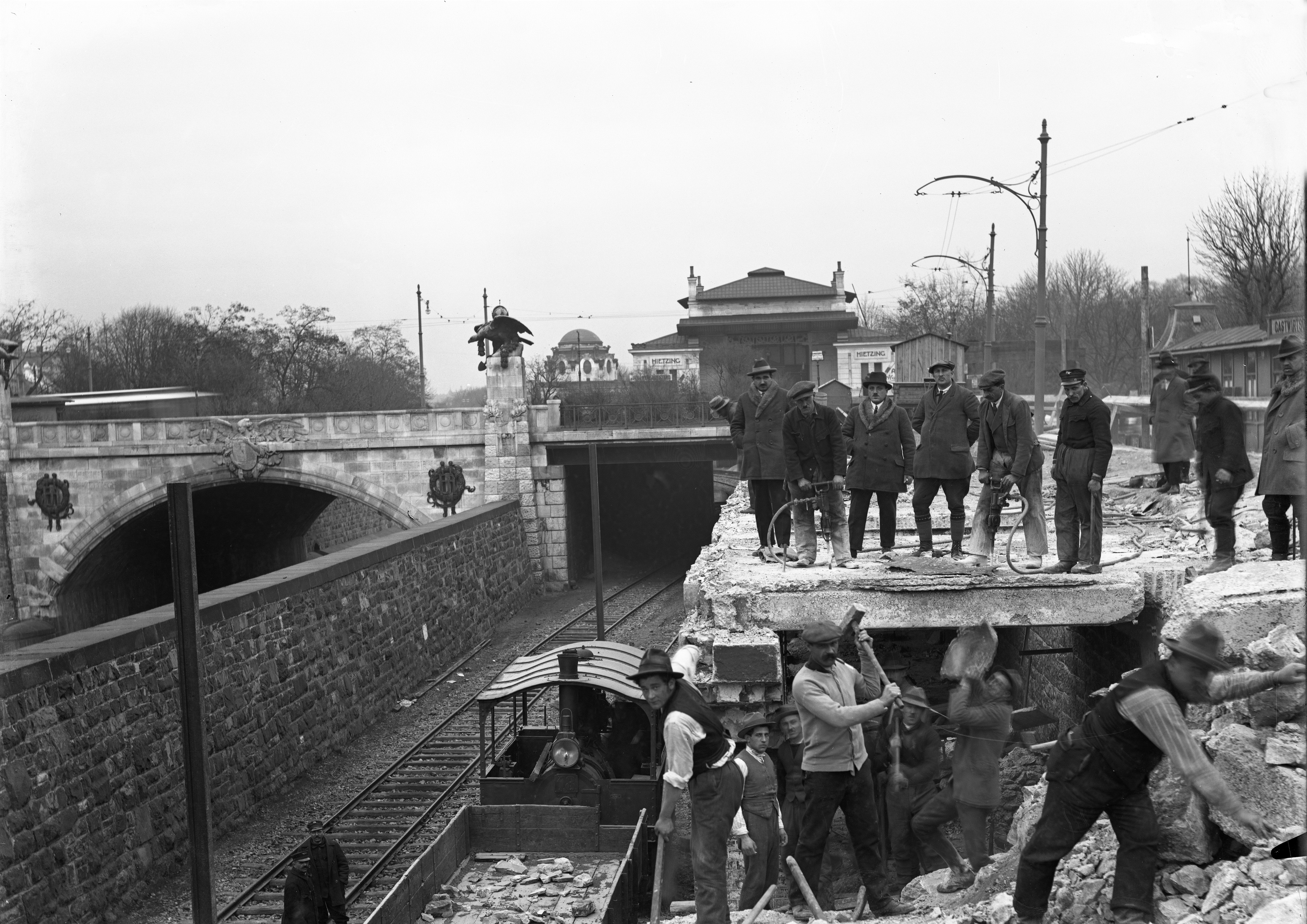 Abtragung der Stützmauer bei der Stadtbahnstation Hietzing um 1920 (Originaltext: «Bau der Stadtbahn / Umbau auf elektrischen Betrieb der Stadtbahn in Hietzing, um 1920»)